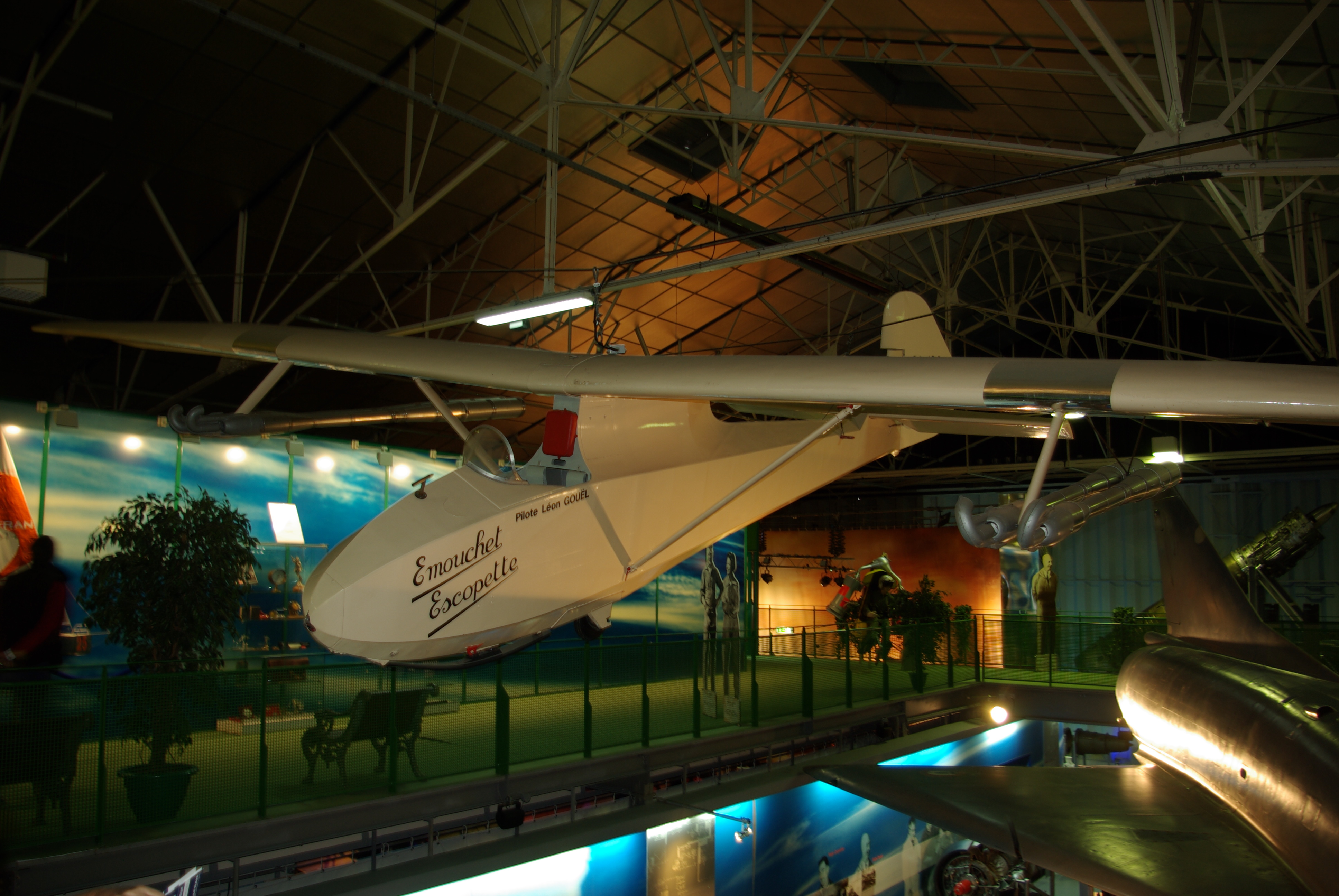 Planeur SA.103 Émouchet propulsé par 4 pulsoréacteurs Escopette présenté au musée Safran.